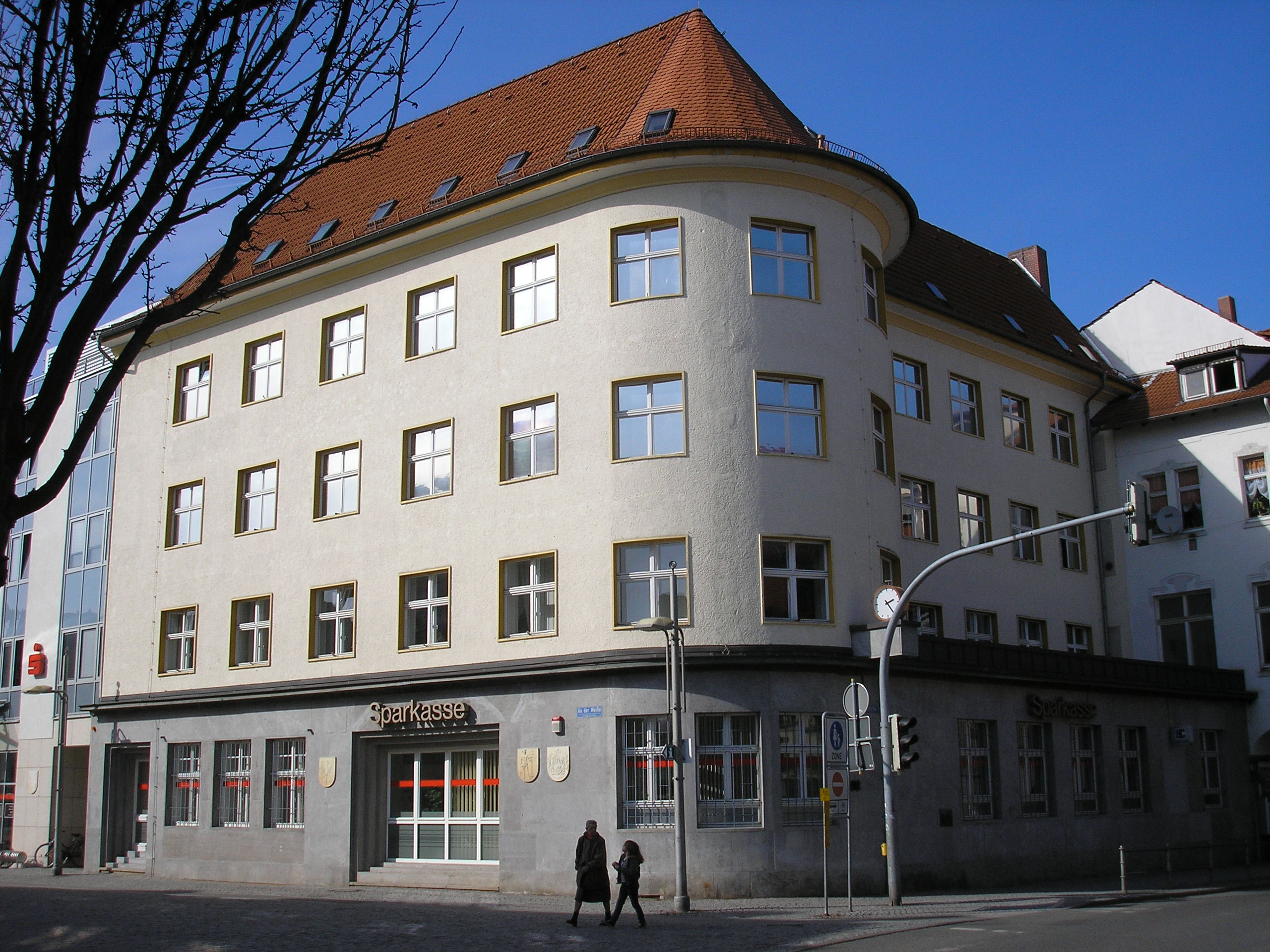 Die Sparkasse in Arnstadt (Thüringen).